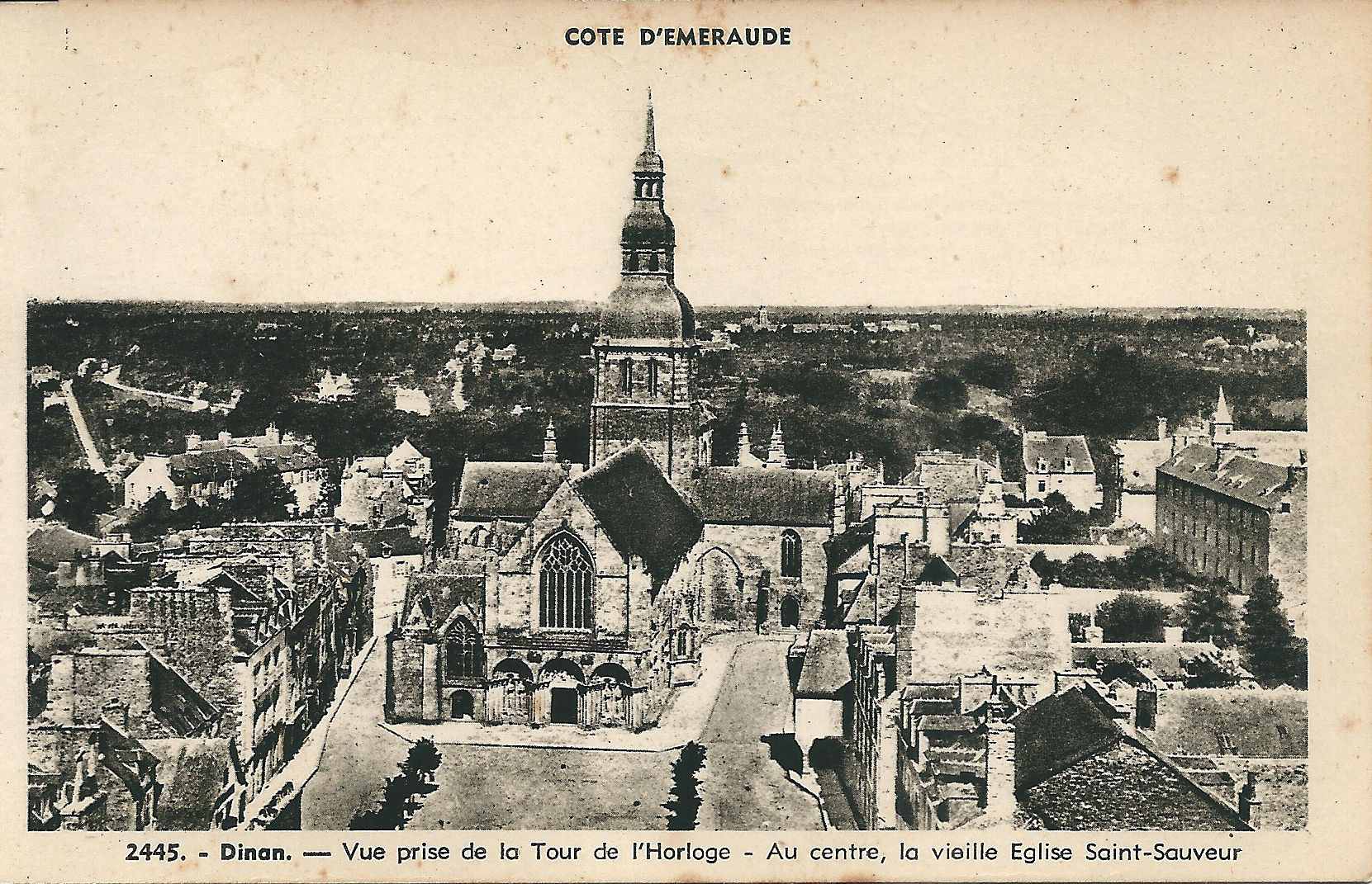 Dinan (Côte du Nord , France) ; carte postale